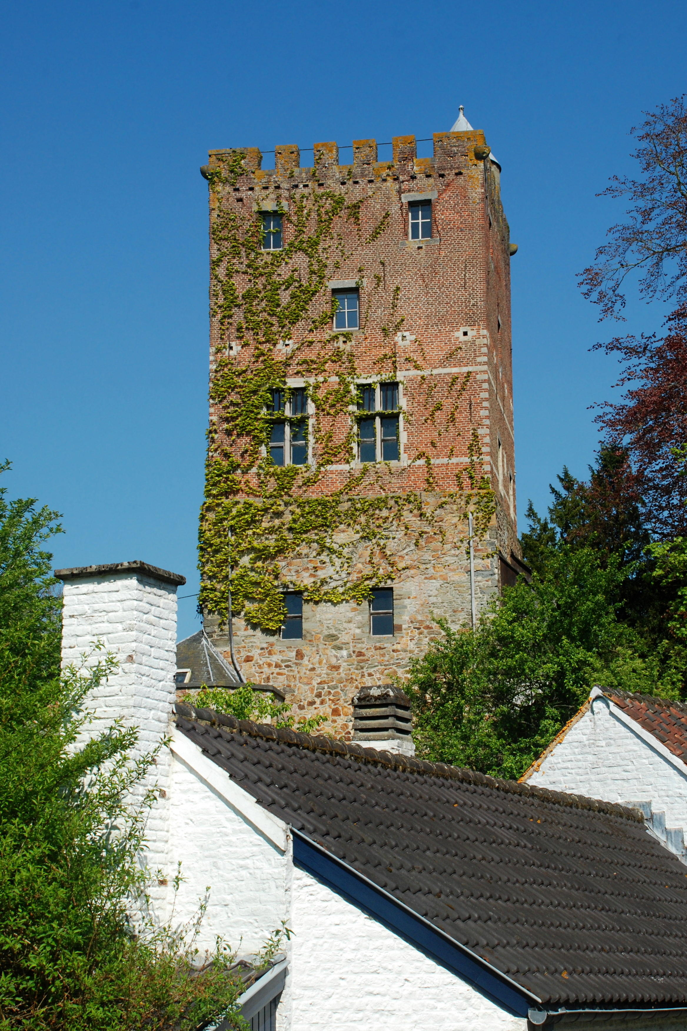 Belgique - Brabant wallon - Mont-Saint-Guibert - Hévillers - Donjon de Bierbais